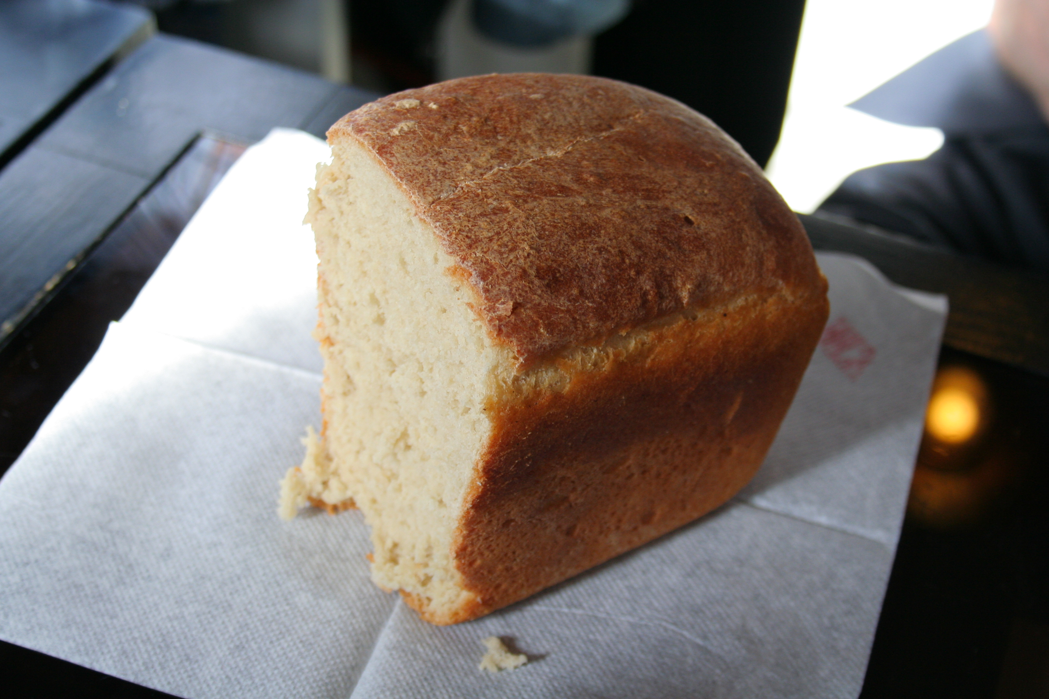 Originalbrot aus dem Butyrka-Gefängnis in Moskau.